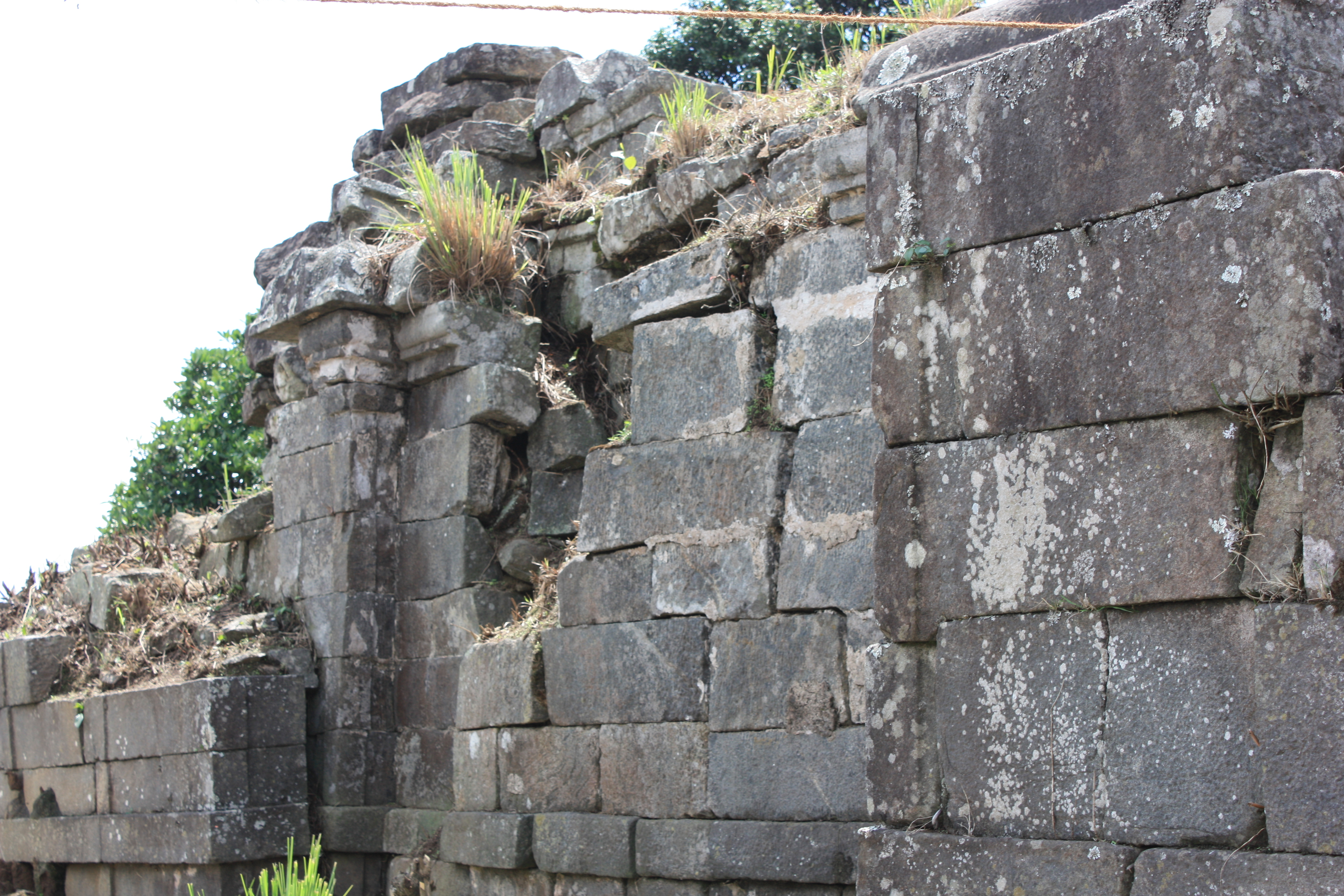 kannaki temple